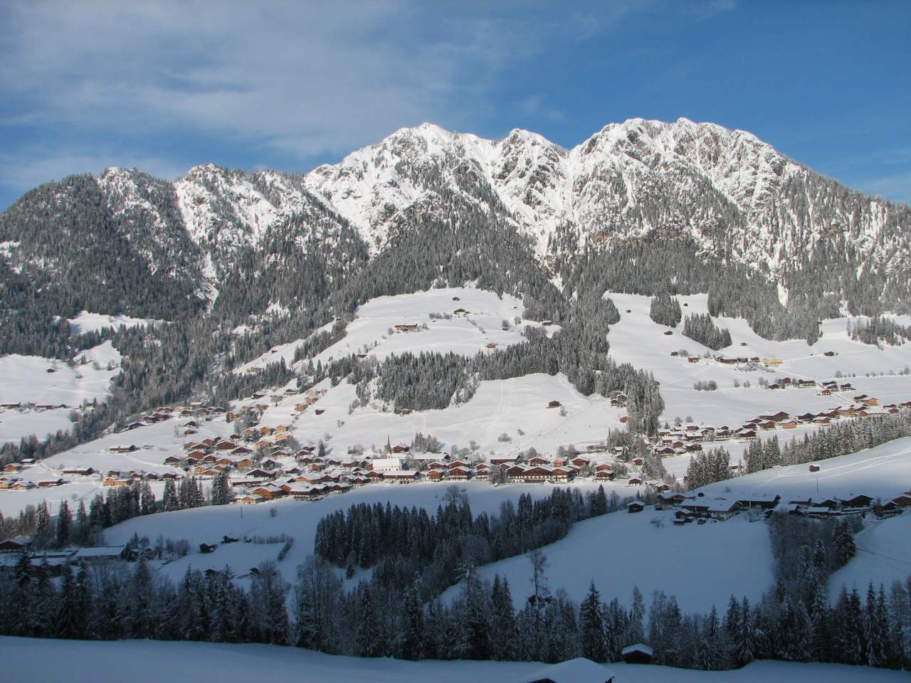 Alpbach im Winter 2005/2006